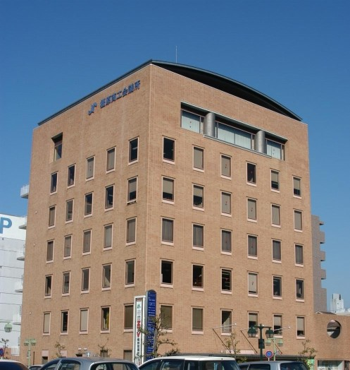 kasiharasisyoukoukeizaikaikan outward appearance